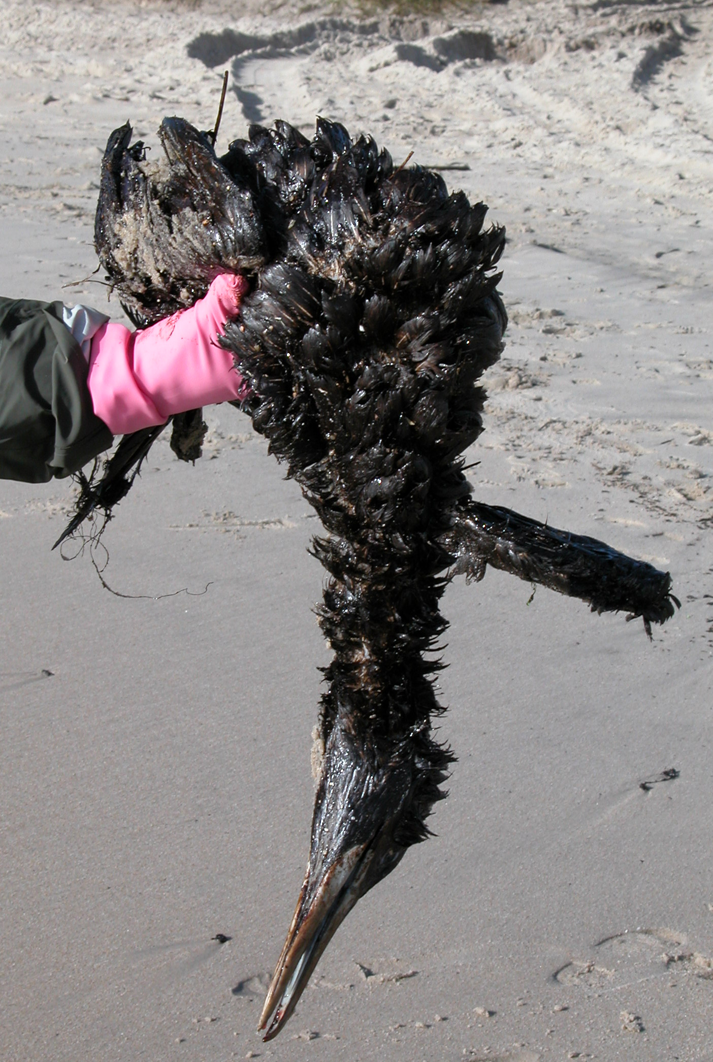 Descrición: Mascato (Sula bassana) petroleado polo Prestige na praia da Lanzada, O Grove.